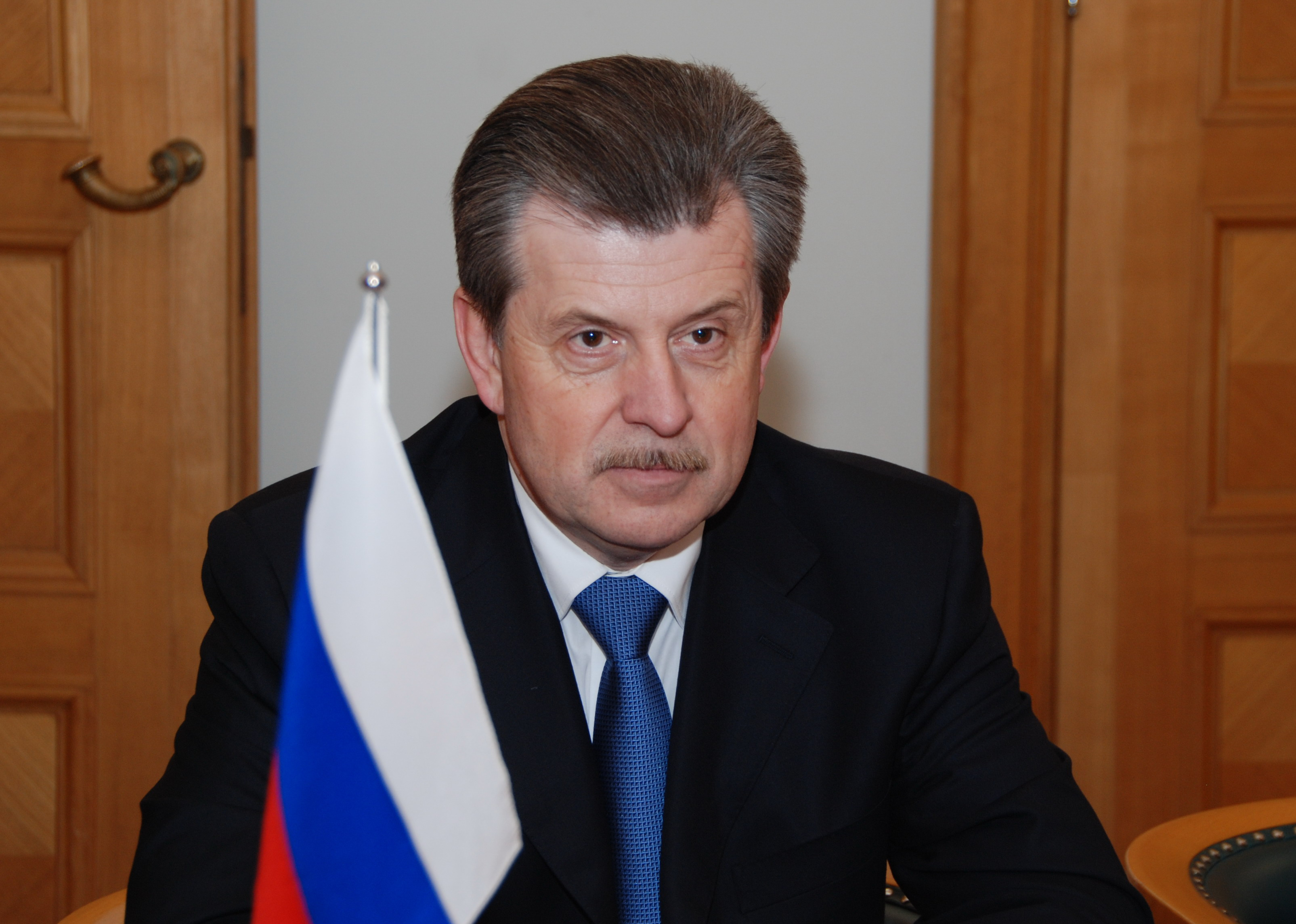 Jaroslavļas gubernators Sergejs Vahrukovs